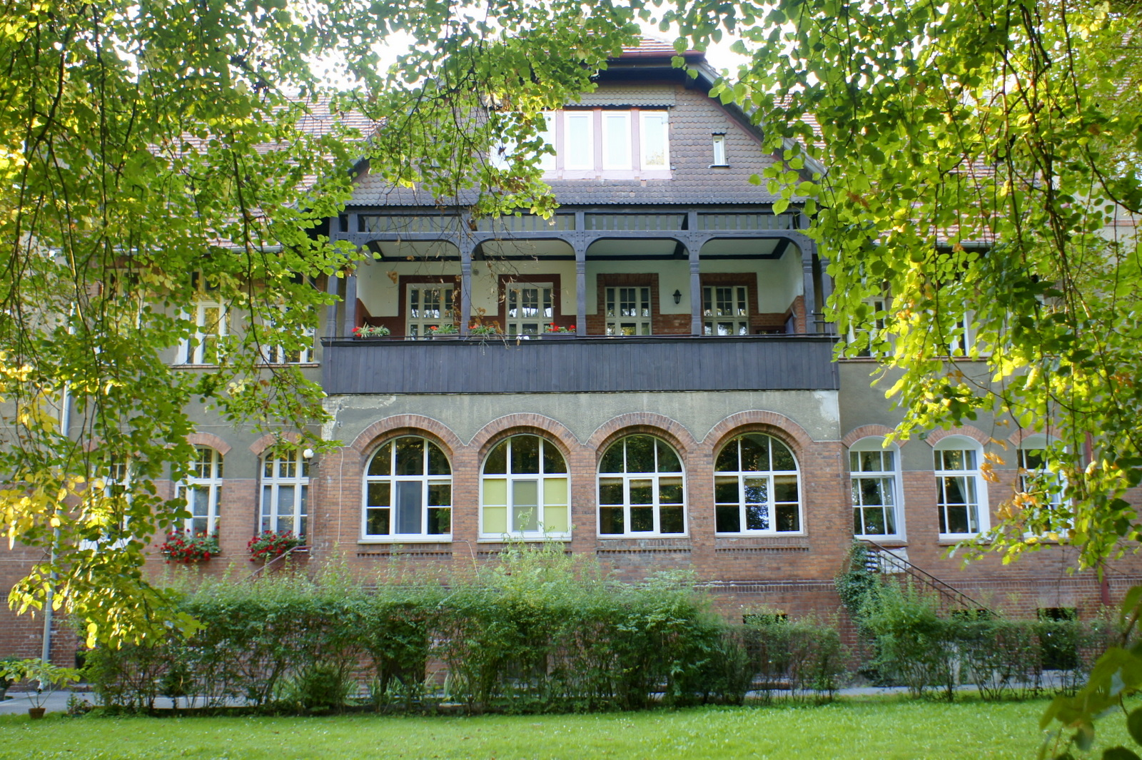 Gorzów Wielkopolski, ul. Walczaka 42 - zespół szpitala, 1885-1935: weranda jednego z budynków mieszkalnych dla personelu szpitala (zabytek nr L-406/A)